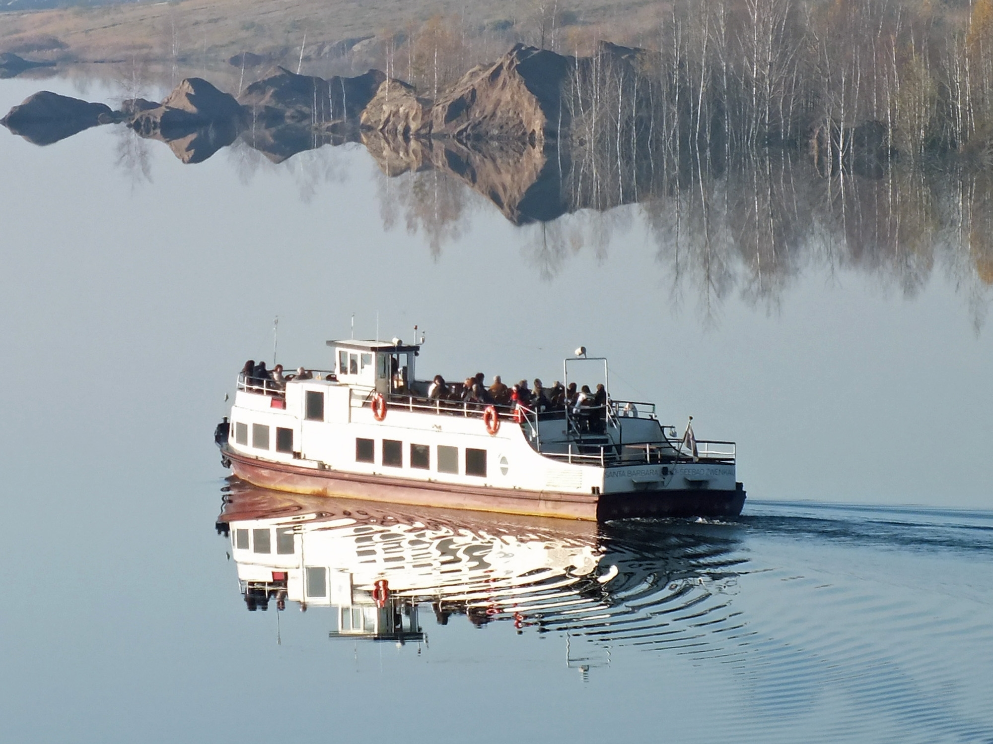 Das Boot Santa Barbara auf Seerundfahrt auf dem Zwenkauer See